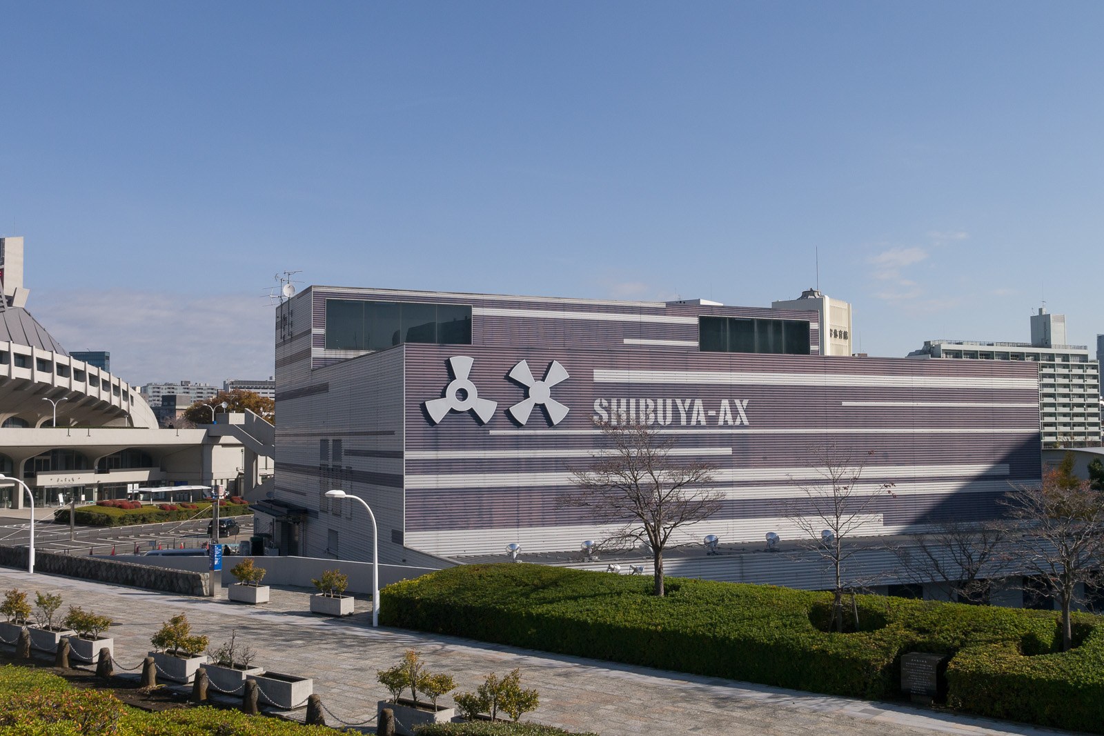 SHIBUYA-AX、東京都渋谷区神南2-1。